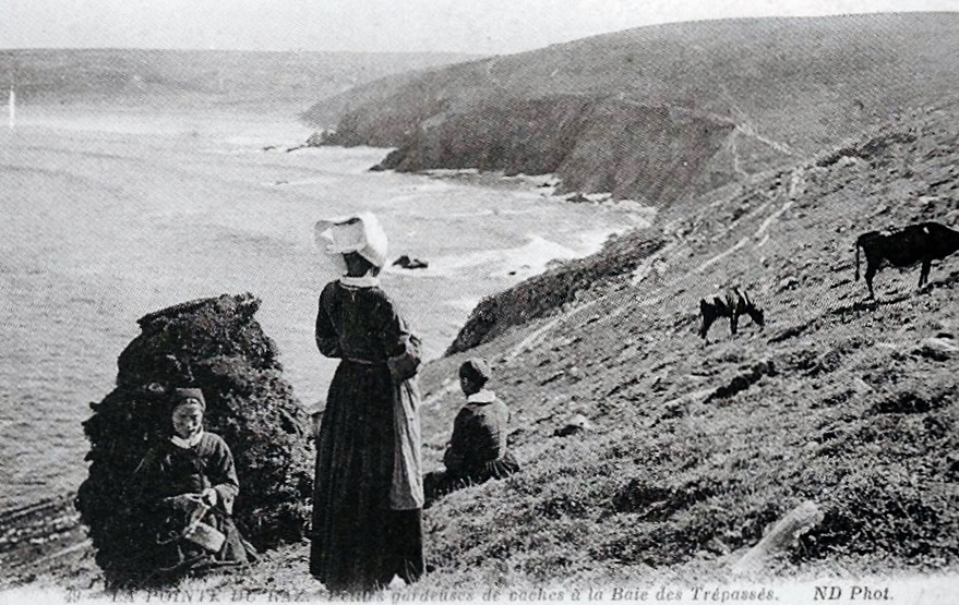 Petites gardeuses de vaches à la Baie des Trépssés (photo prise depuis la côte nord de la Pointe du Raz, la Baie des Trépassés se devine à l'arrière-plan à gauche).